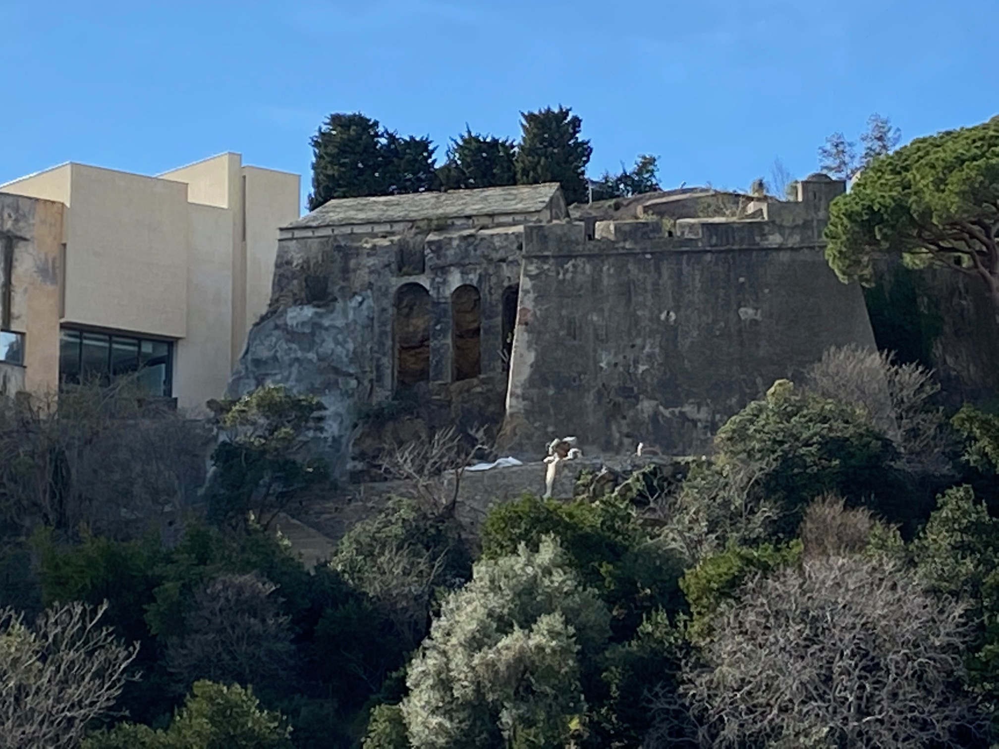 Le bastion San Gerolamo qui surplombe le Vieux-Port, à la Citadelle de Bastia, Corse